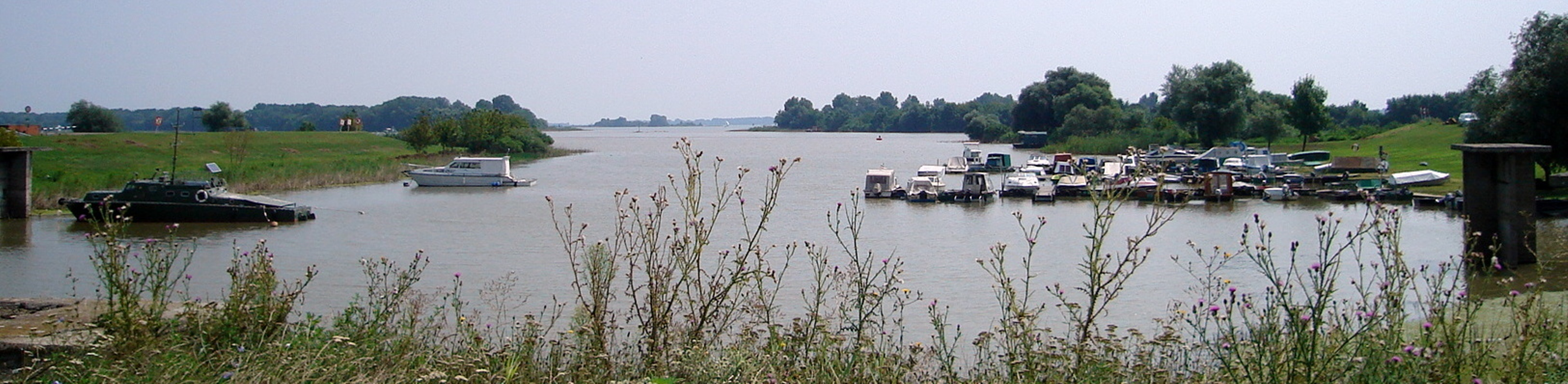 Tisza tó